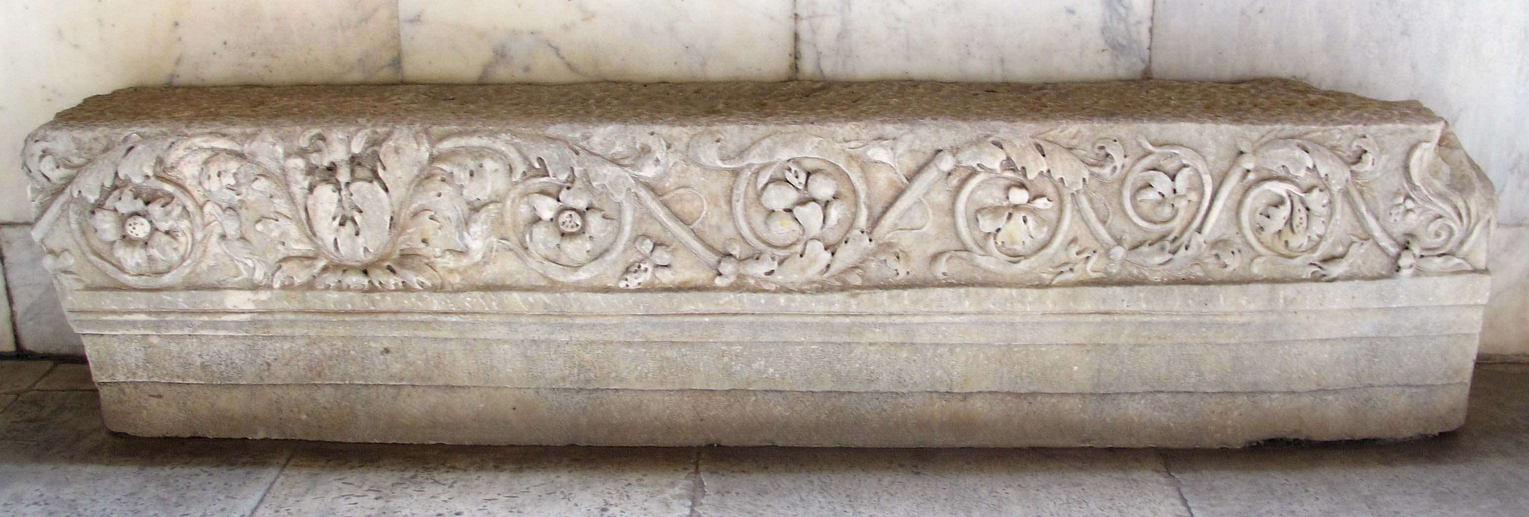 Frammento lapideo decorato